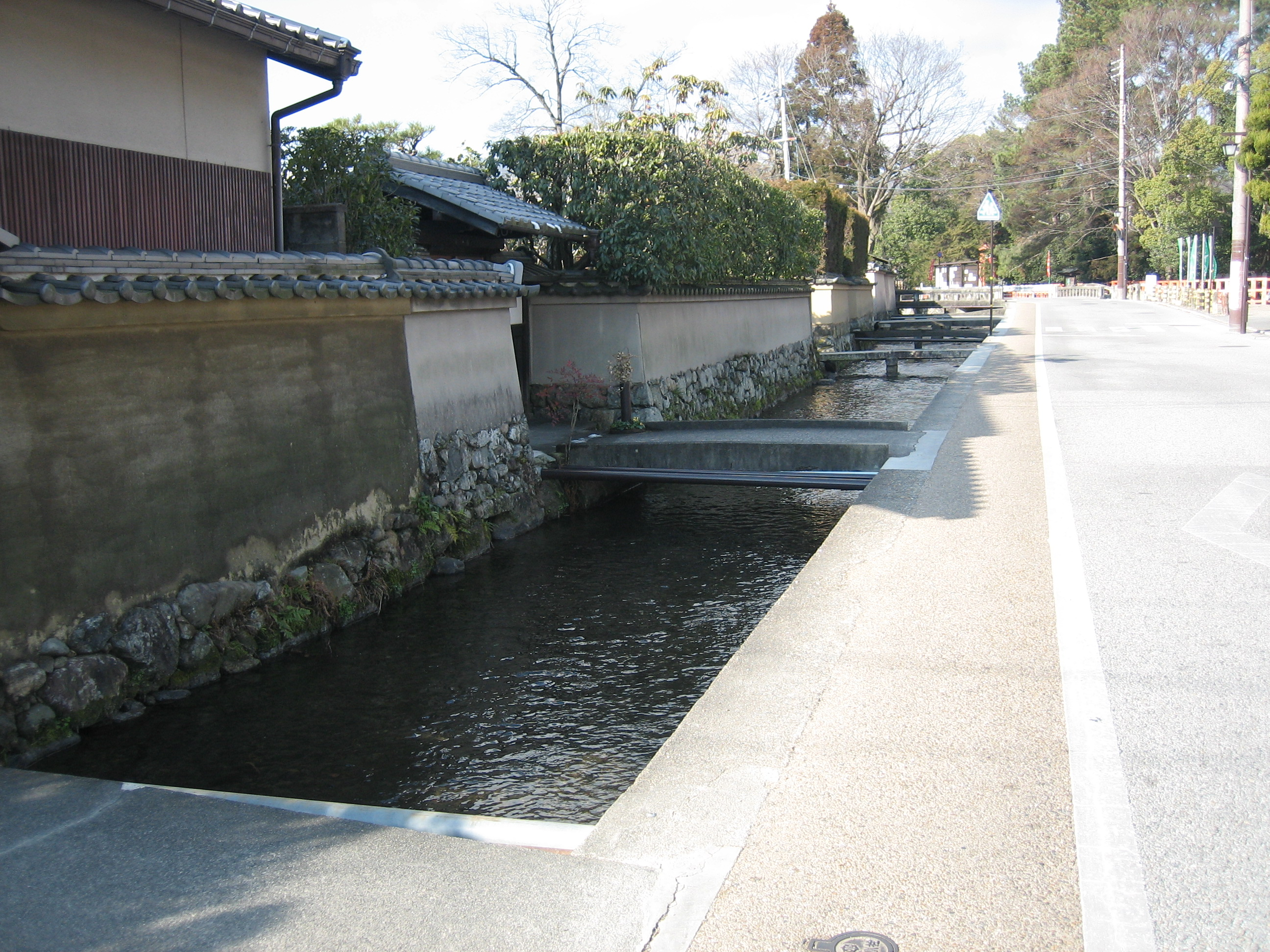 上賀茂本通を京都市北区上賀茂池殿町から撮影